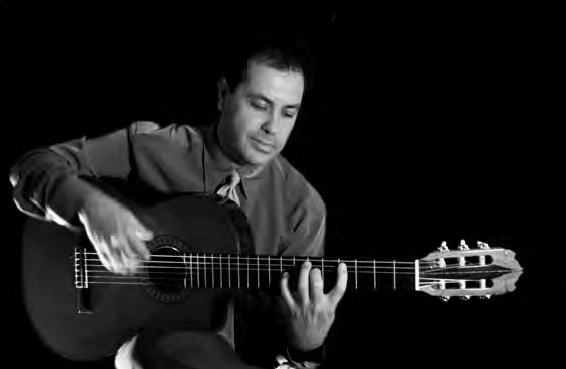 Mario Grimaldos - Guitarrista y Compositor de Jazz